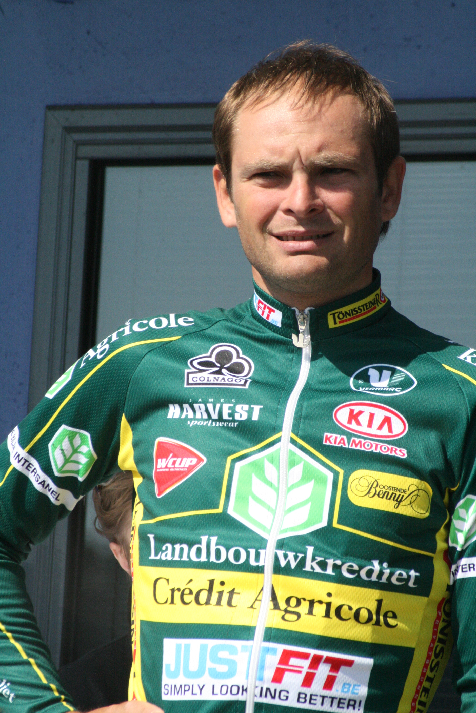 Présentation des coureurs au départ de la première étape Koen Barbé